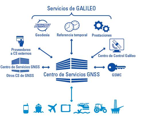 Servicios GSC